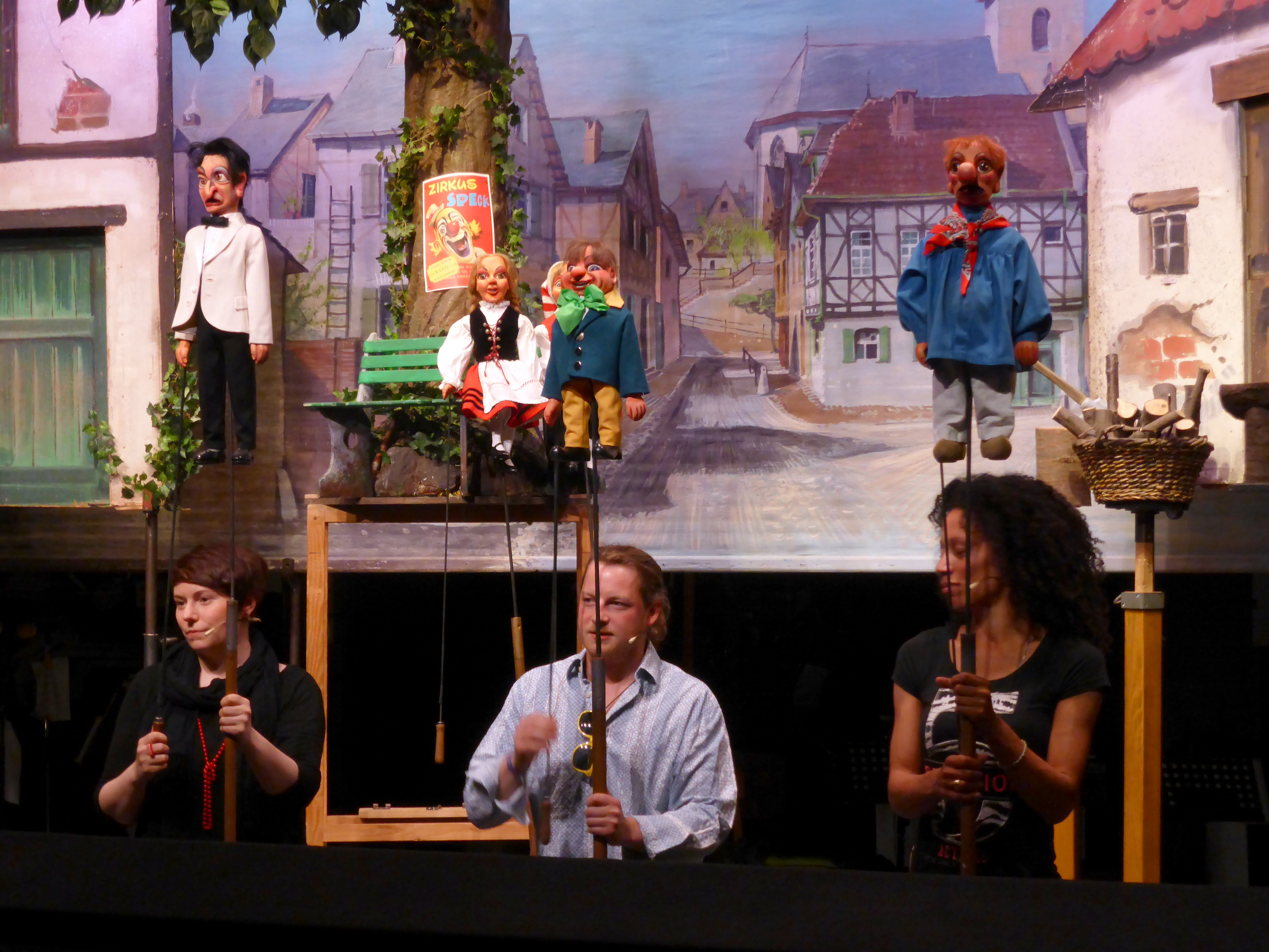 Hänneschen-Theater, "Hinger d'r Britz" im Mai 2016. Puppenspieler: Links: Verena Wessel Mitte: Stefan Mertens Rechts: Katja Solange Wiesner